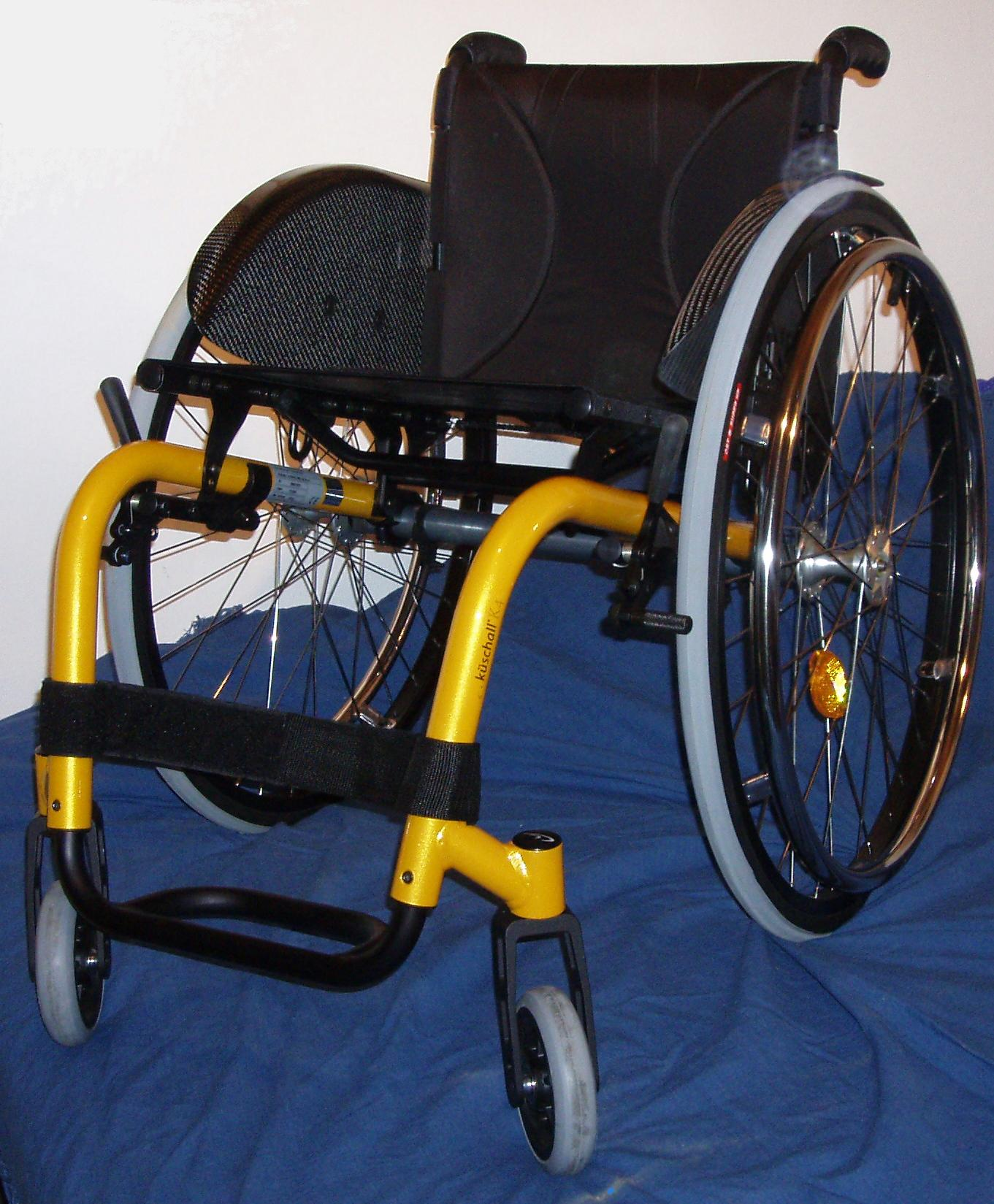 Starrrahmenrollstuhl (K4)